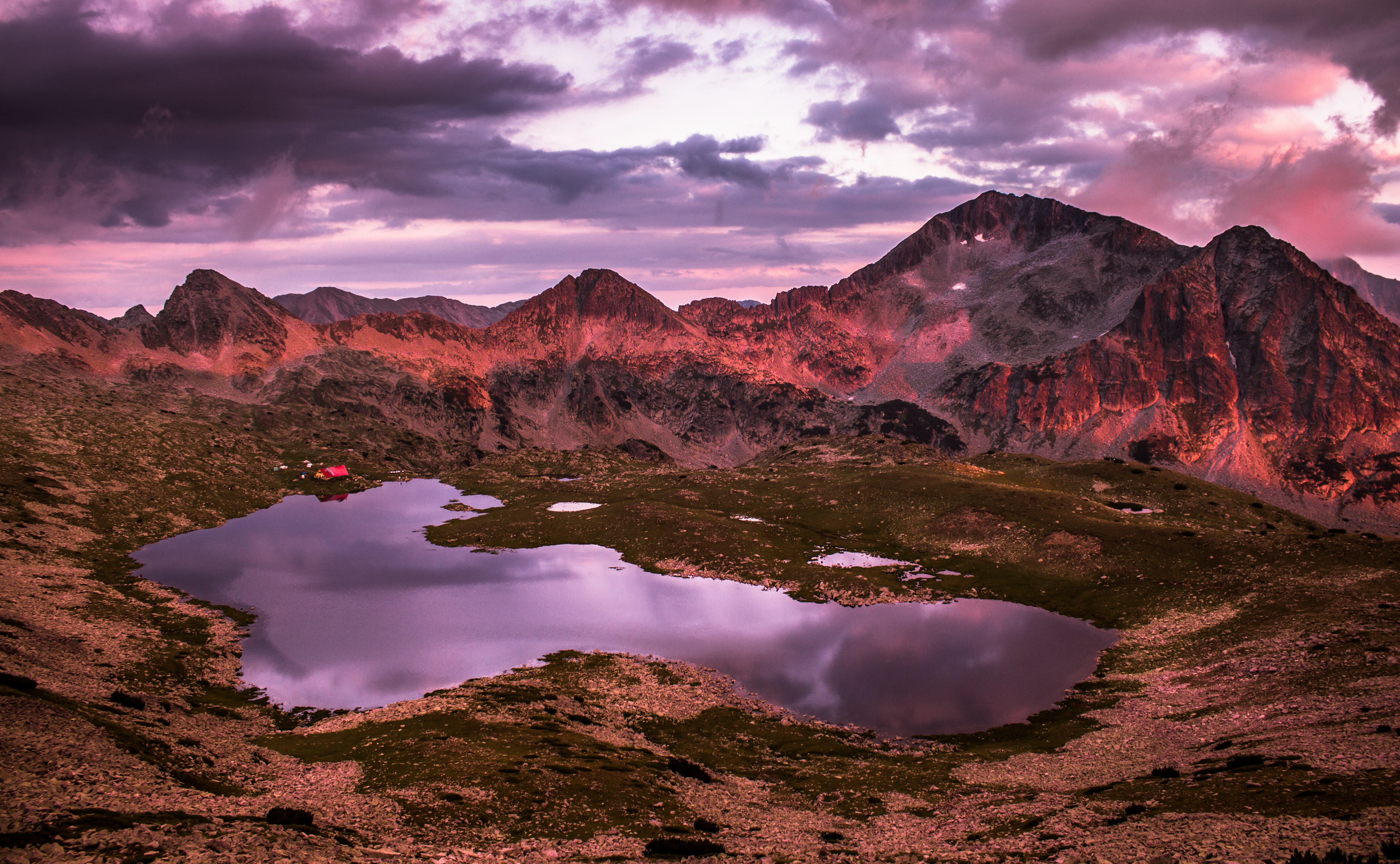 Пирин, Пирин